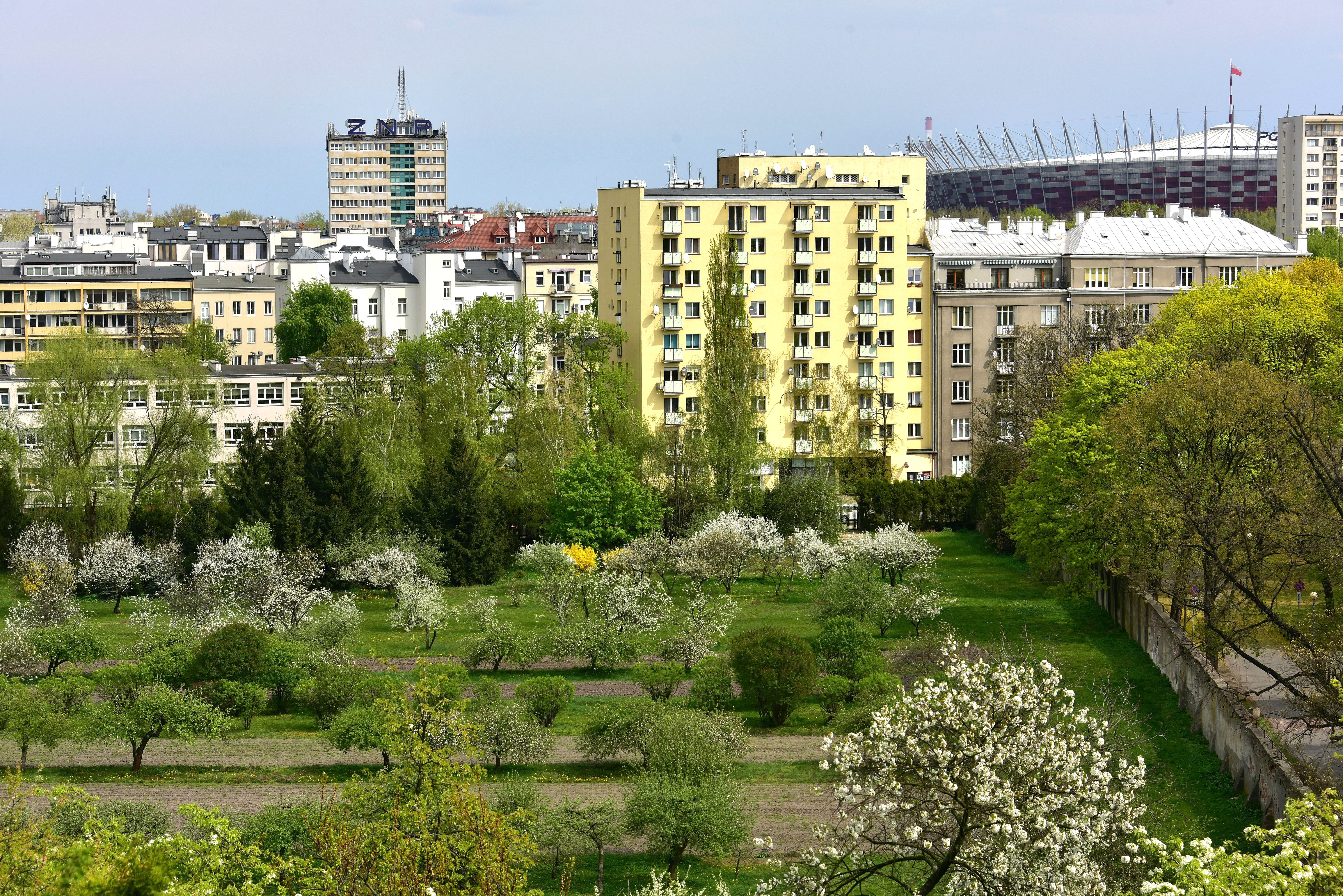 Zabudowa Powiśla w rejonie ul. Leona Kruczkowskiego, na pierwszym planie ogród szarytek